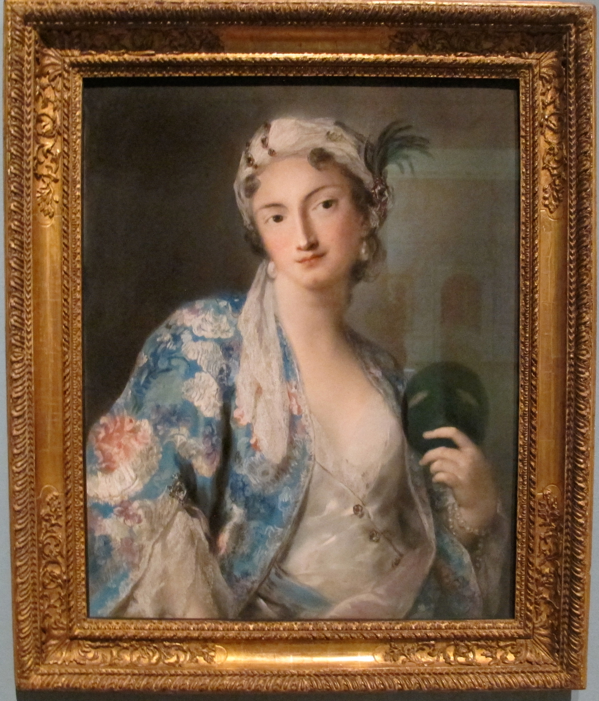 in vestito turco